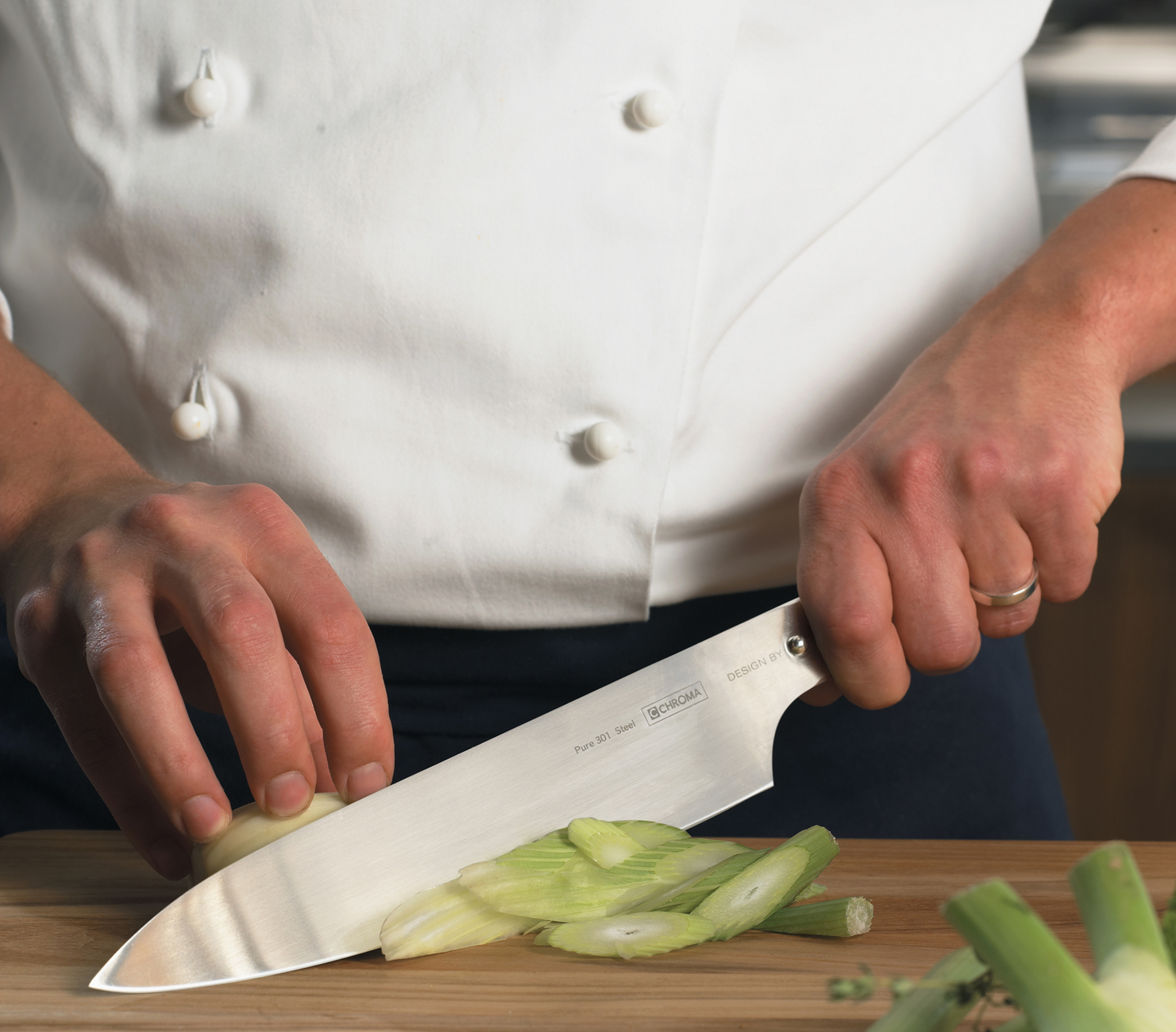 Chroma Typoe 301